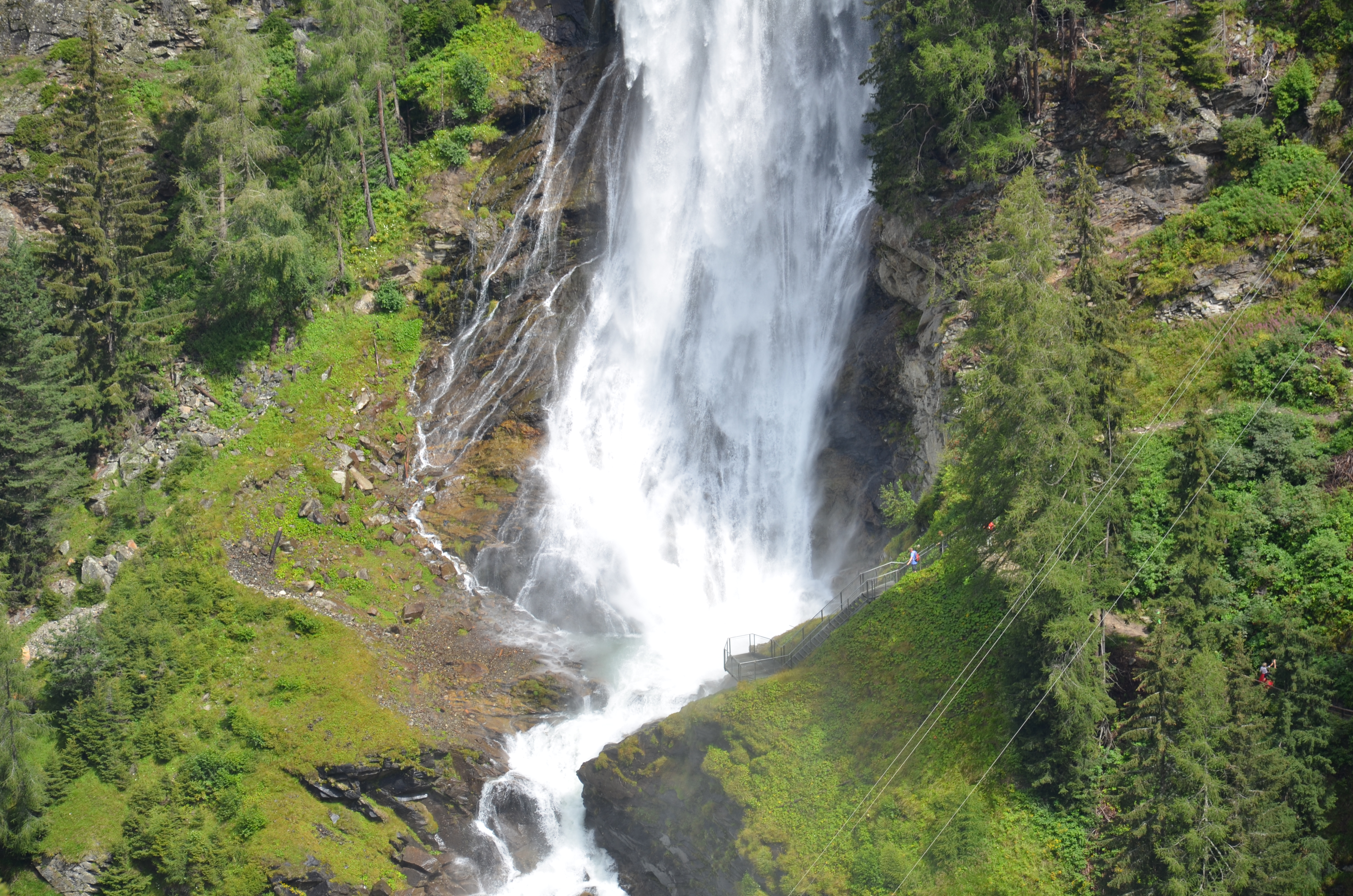 Stuibenfall in Tirol , mittlerer teil mit dem ersten Sammelbecken